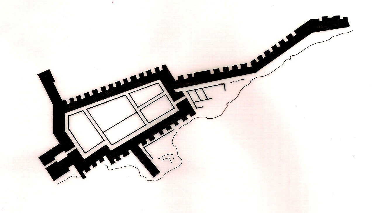 Plan de la forteresse de Shalfak en nubie